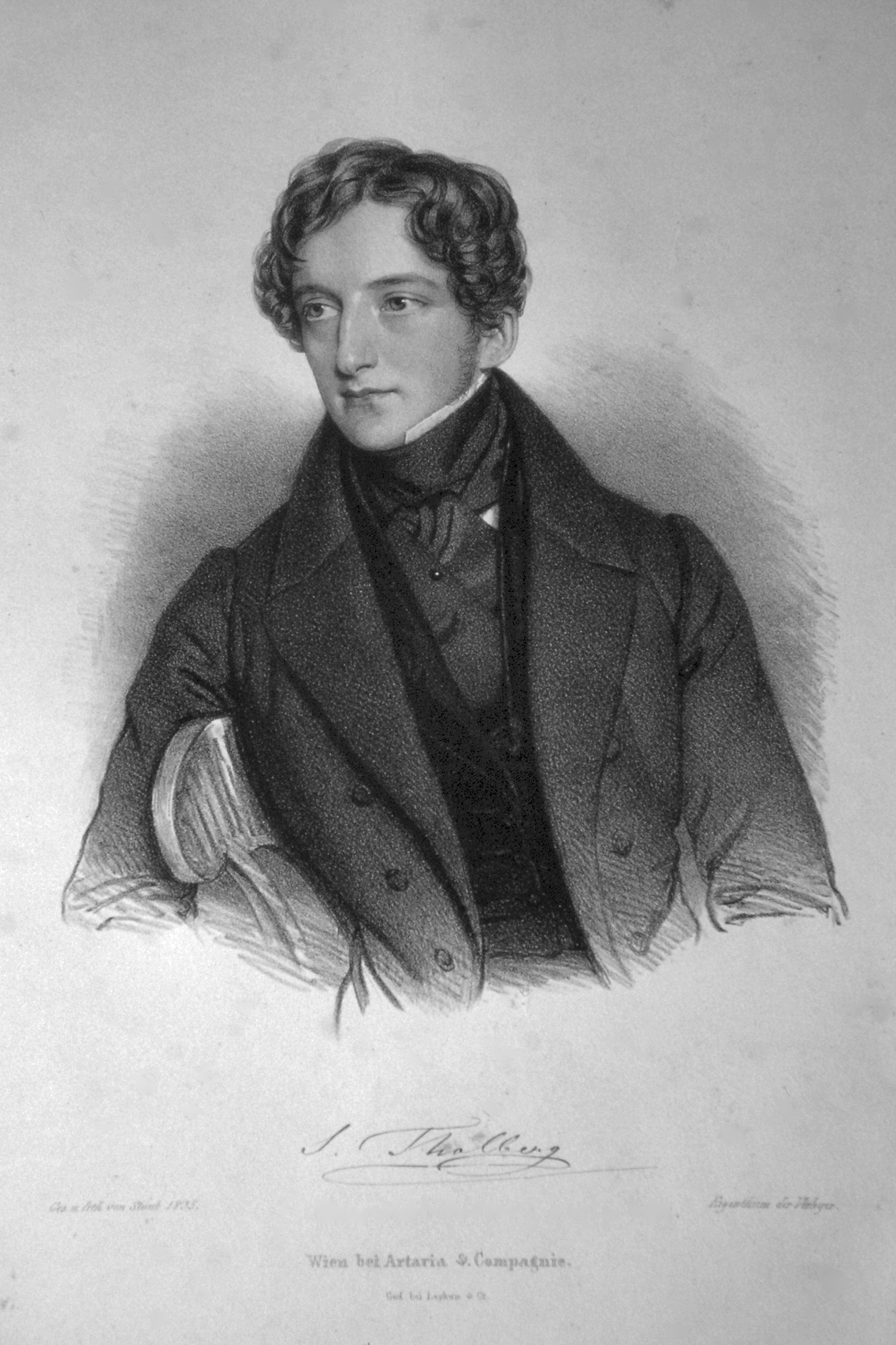 Sigismund Thalberg (1812-1871), österreichischer Pianist und Komponist. Lithographie.